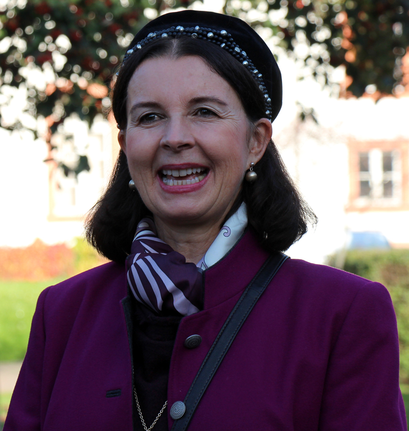 Lisa Witasek anlässlich der Verleihung des Stern der Satire für Ihren verstorbenen Mann Ephraim Kishon in Mainz